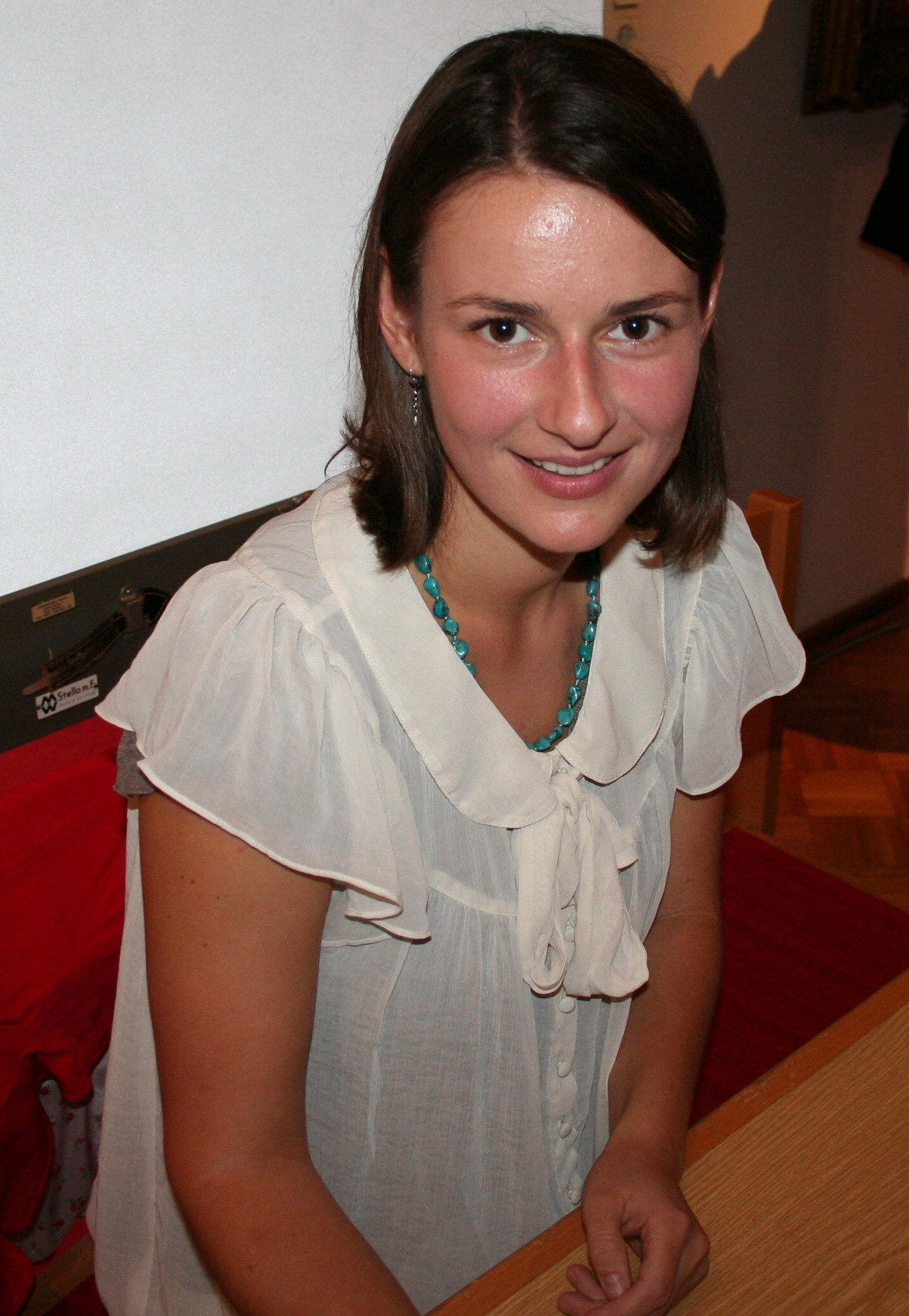 Schauspielerin Annett Renneberg im Wormser Kunsthaus Heylshof nach einem Interview vor Publikum